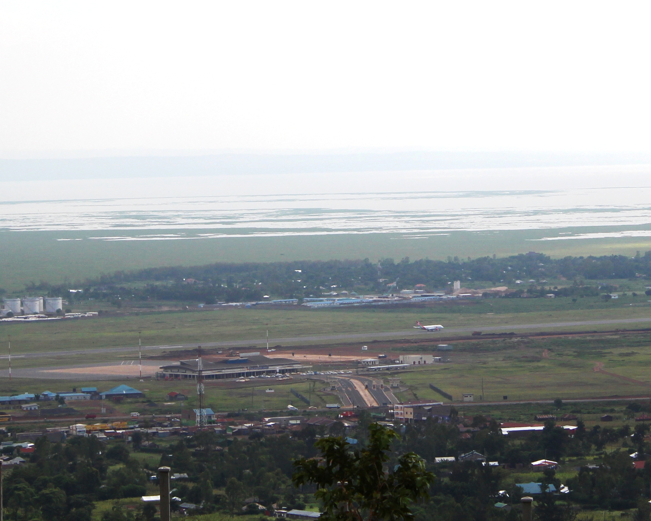 Kisumu Airport, Kenya. KQ Plane taking off...